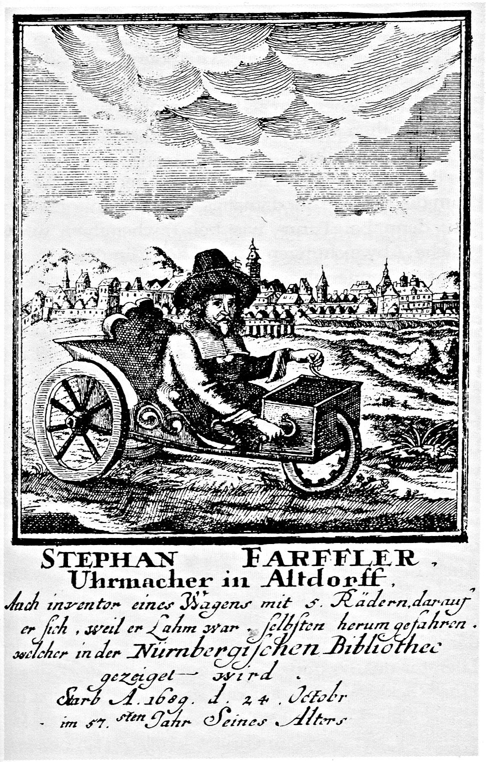 Stephan Farffler Uhrmacher in Altdorff, Auch inventor eines Wagens mit 3 Rädern, darauf er sich, weil er Lahm war, selbsten herumgefahren, welcher in der Nürnbergischen Bibliothec gezeiget wird. Starb A. 1689, d. 24. Octobr, im 57.sten Jahr Seines Alters.